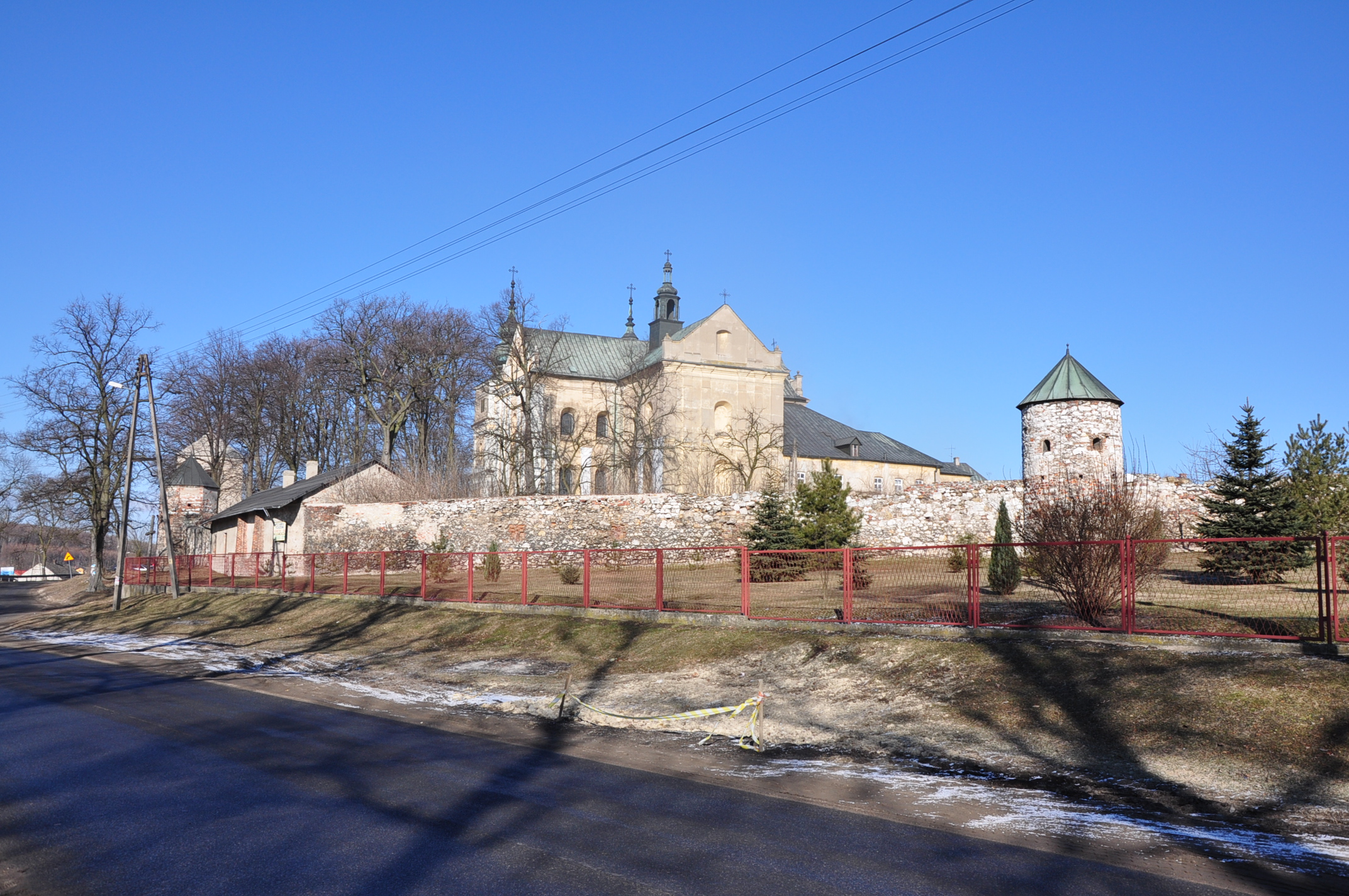 Wancerzów Kościół pw. WNMP.